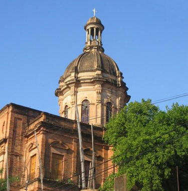 Foto de la Iglesia de la Encarnación, tomada desde una de las calles aledañas - Asunción Paraguay